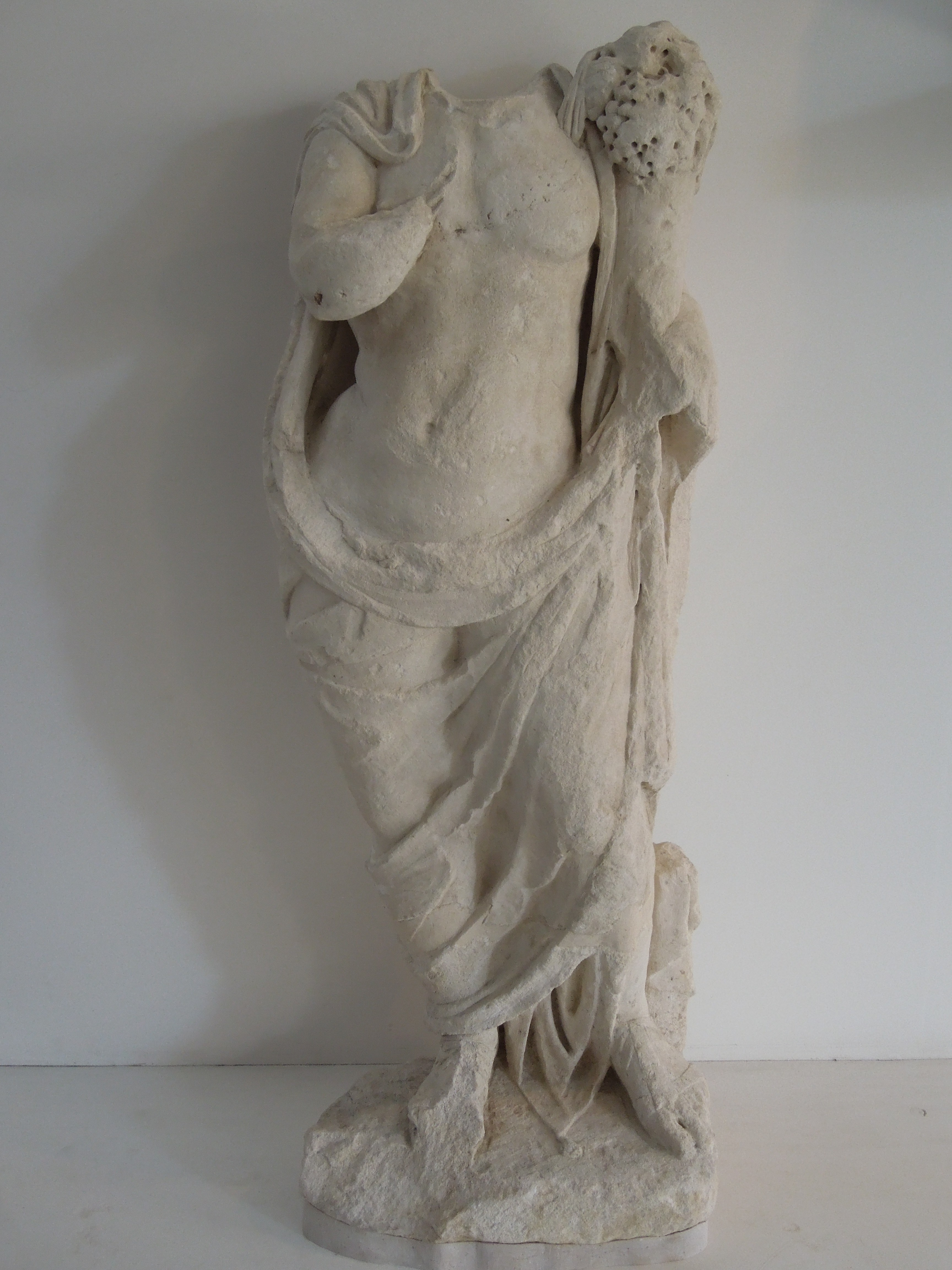 Arles (Bouches-du-Rhône, France), au musée départemental de l'Arles antique, statue d'Harpocrate, en calcaire des Bois des Lens (région de Nîmes), premier siècle, découverte le 28 janvier 1841 dans une maison au sud-ouest de l'amphithéâtre. Représentation du dieu d'origine égyptienne Harpocrate, fils d'Isis, d'aspect juvénile et potelé, portant toge, manteau et sandale avec un déhanché évitant frontalité et symétrie. L'avant-bras droit, lacunaire, plaqué le long de la poitrine et remontant vers le visage, permet de deviner que le dieu portait l'index de la main vers sa bouche. Le geste traduisait l'enfance dans l'Égypte pharaonique et faisait croire, dans le monde gréco-romain, que le dieu symbolisait le silence, taisant des secrets qui ne pouvaient être révélés aux profanes. L'avant-bras gauche porte, serrée contre le corps, une corne d'abondance, attribut grec, mais introduit en Égypte dès les débuts de l'époque hellénistique, d'où s'échappent des feuilles de vigne, des grappes de raisin ainsi, peut-être, qu'un épi de blé. Elle représente les bienfaits apportés par la crue du Nil. La tête manque, qui aurait permis de voir la chevelure bouclée du dieu avec par-dessus, sans doute, une couronne d'origine égyptienne et un lotus. Harpocrate représentait ainsi le démiurge issu du lotus jailli des eaux primordiales.